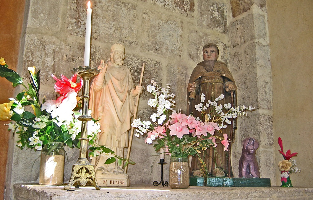 les deux saints patrons des agriculteurs et de la commune, autrefois fêtés les 3 février et 17 janvier...la statue de St Antoine est l’œuvre d'un artisan local